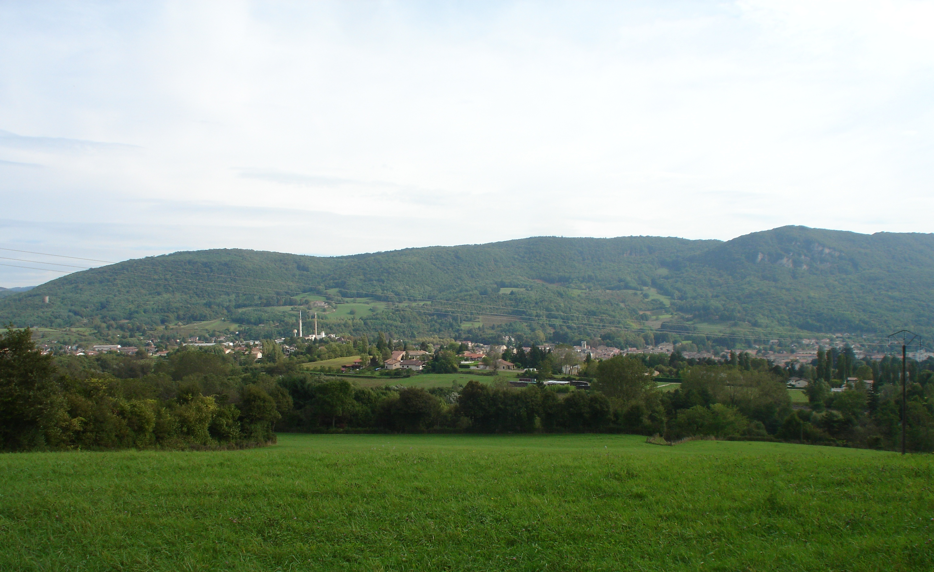 Panorama depuis la Tour de Montvert (à droite) jusqu'au Bramafan (à gauche) point culminant à 560m et surplombant la ville. Au sommet du Bramafan a été érigée une grande croix métallique bénie par Mgr Labeuche en 1909 - LAGNIEU (01150-FRANCE)